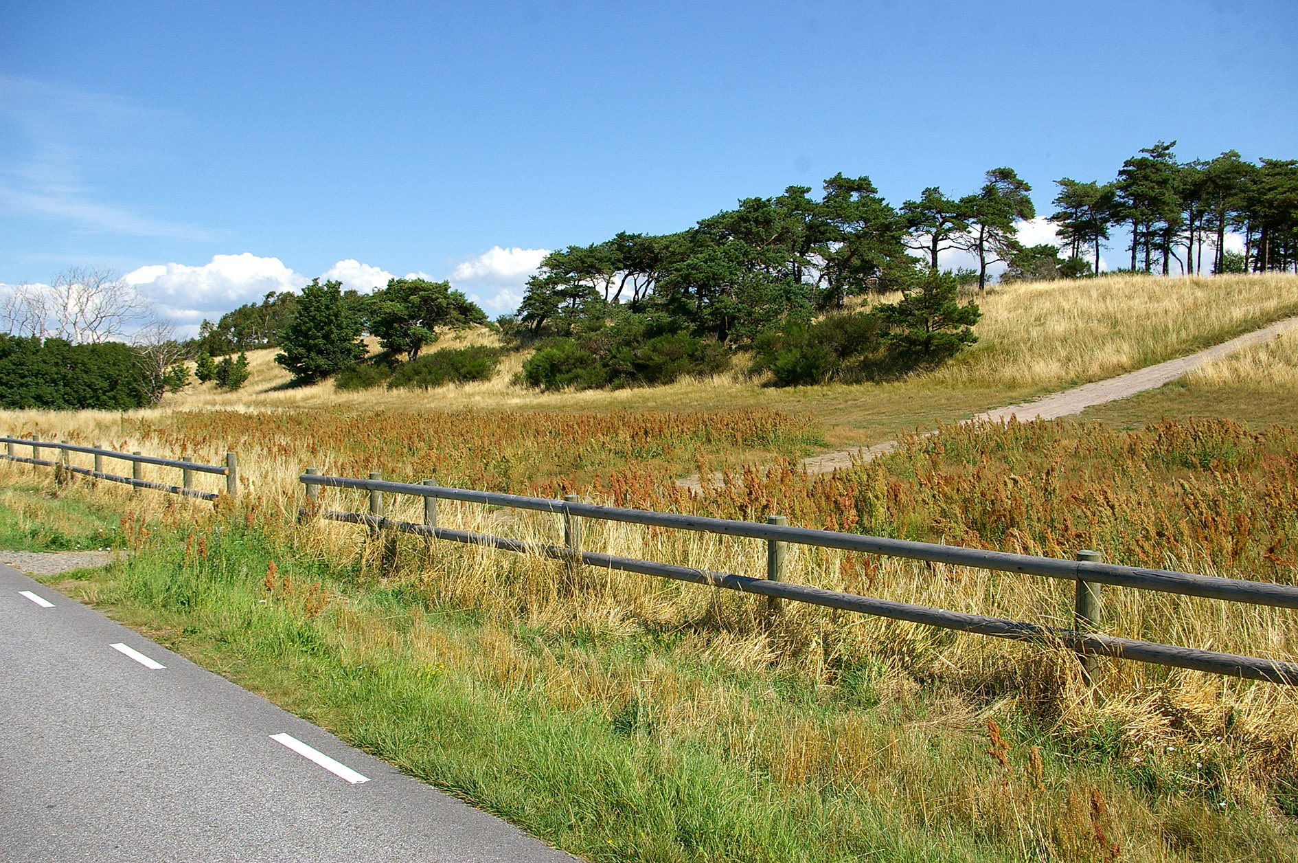 Standvallen Järavallen mellan Landskrona och Barsebäck i Skåne, Sverige.